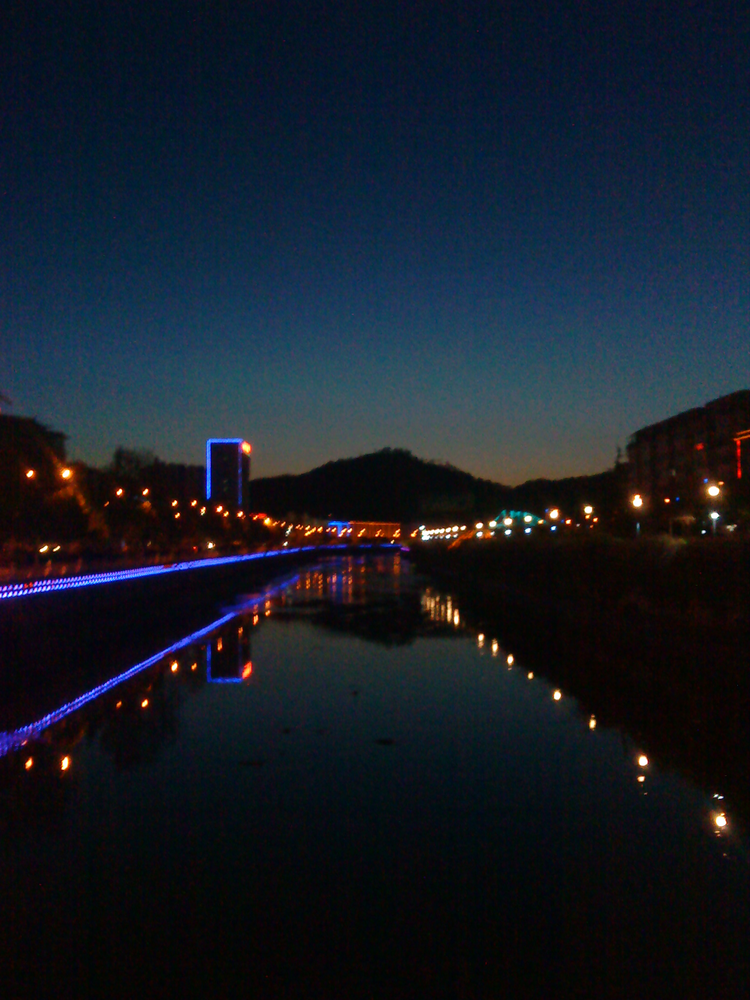 楚雄市的龙川江